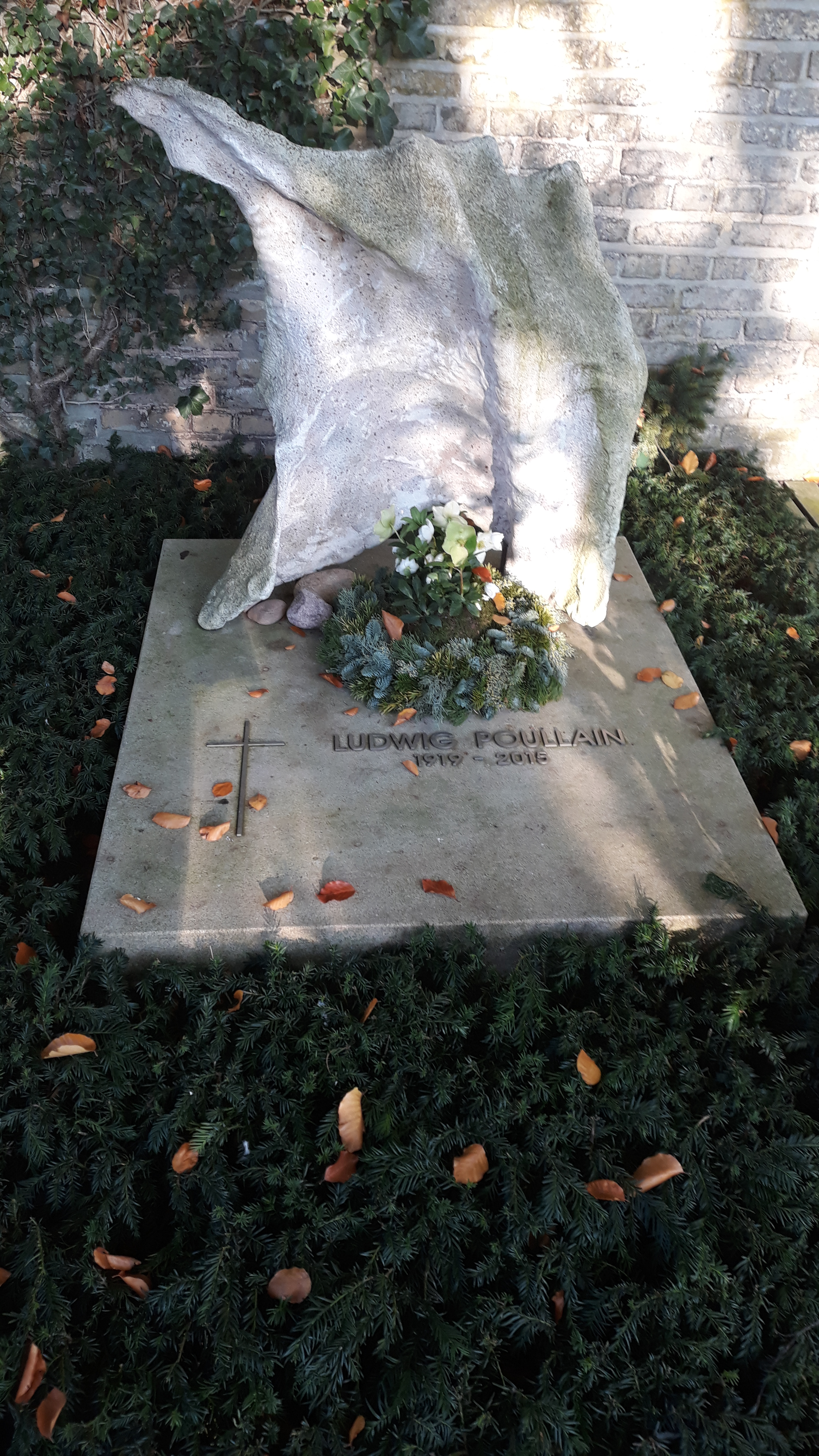 Das Grab des deutschen Bankiers Ludwig Poullain auf dem Zentralfriedhof Münster.